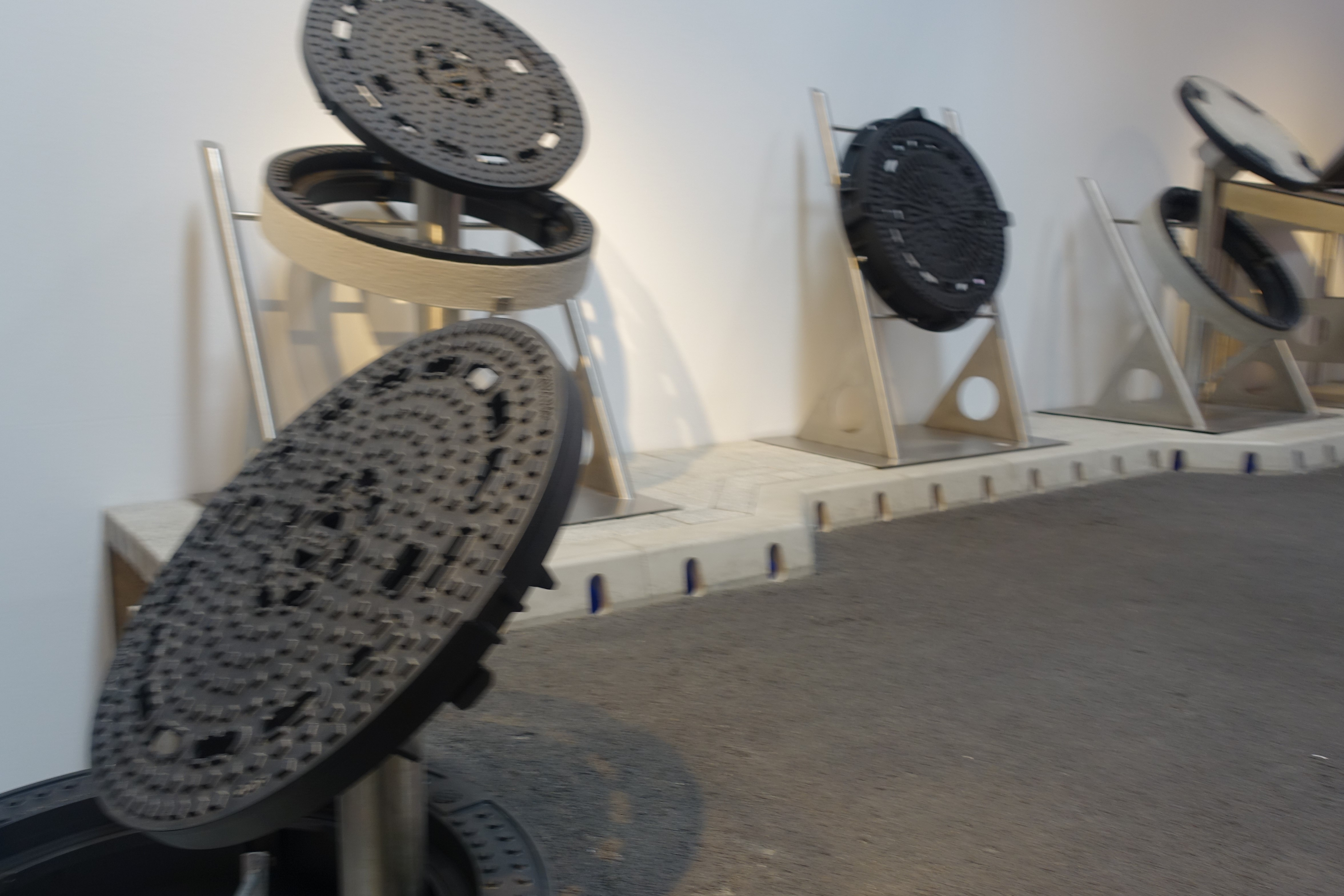 ACO Gruppe Ausstellungsraum der produzierten Produke in Büdelsdorf